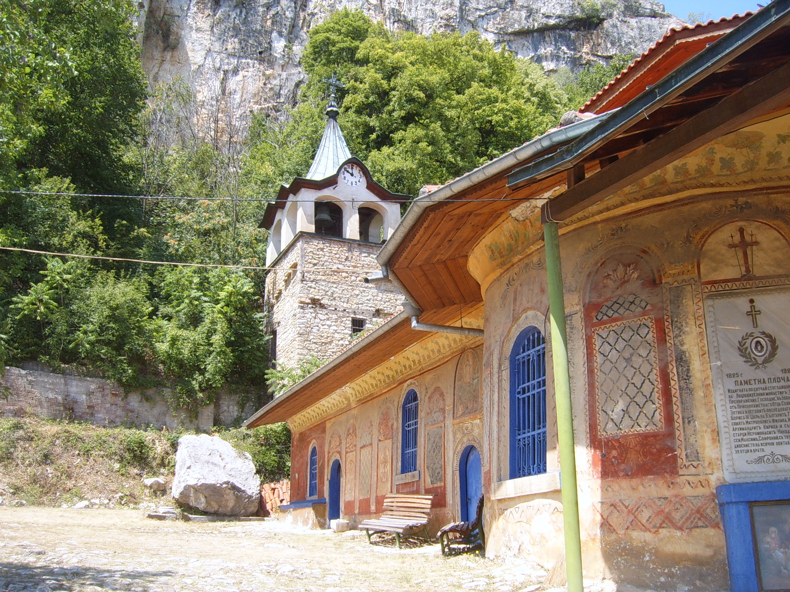 Преображенски манастир / Transfiguration Monastery, Bulgaria